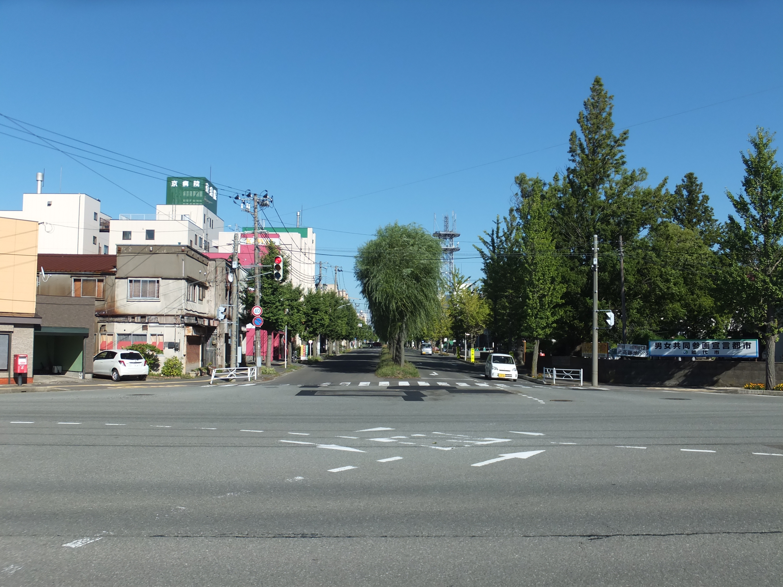 国道101号市役所入口交差点より、市役所方向を望む。